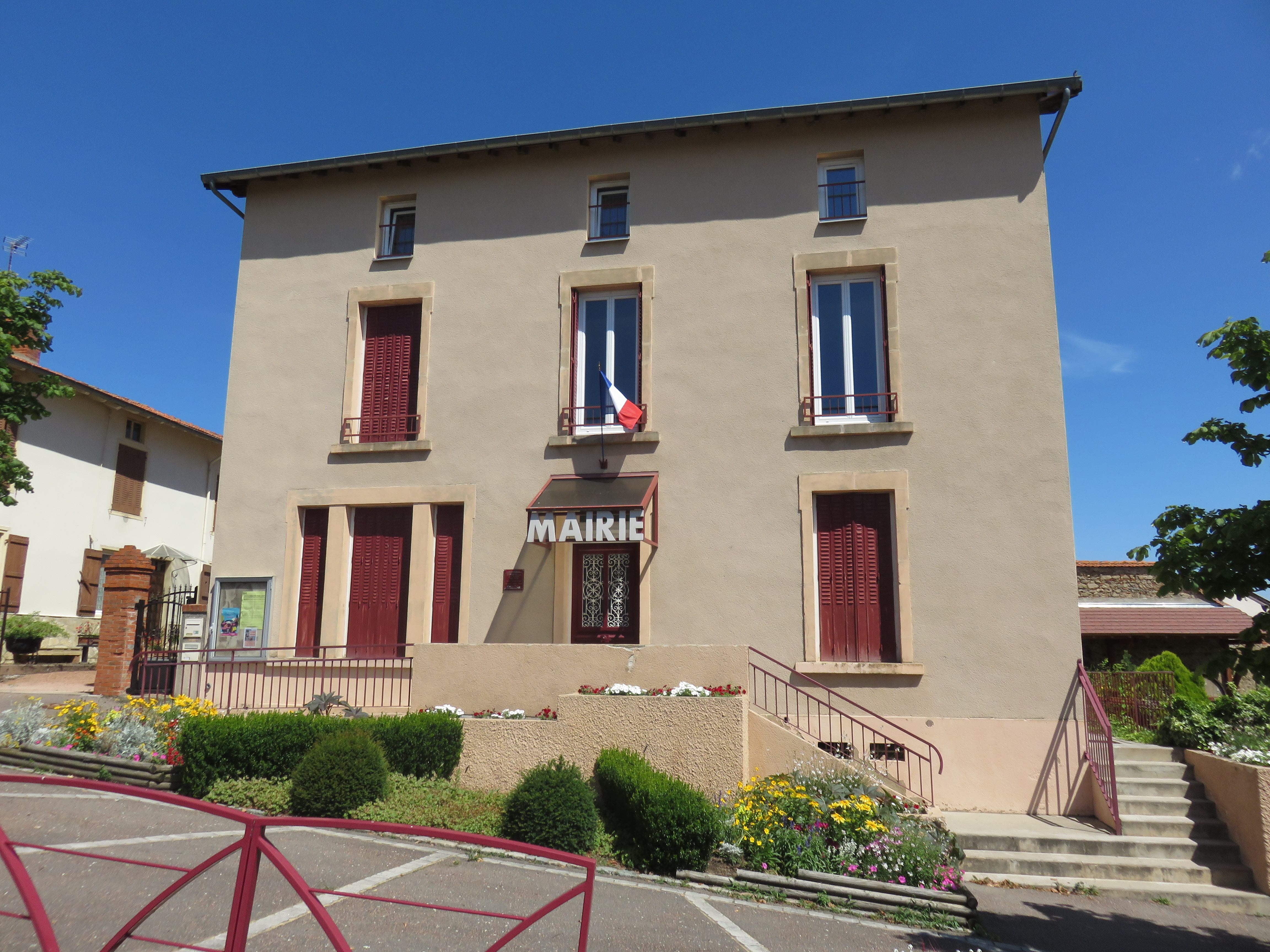 Mairie de Villemontais (Loire, France).